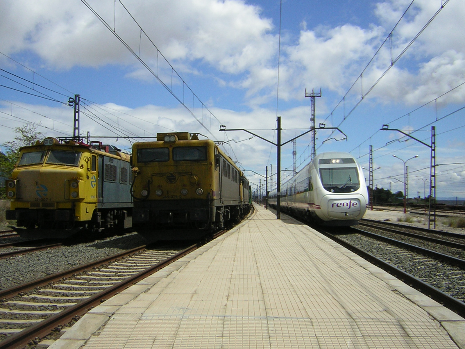 Adelantamiento de un tren serie 120 a dos mercancías en La Encina